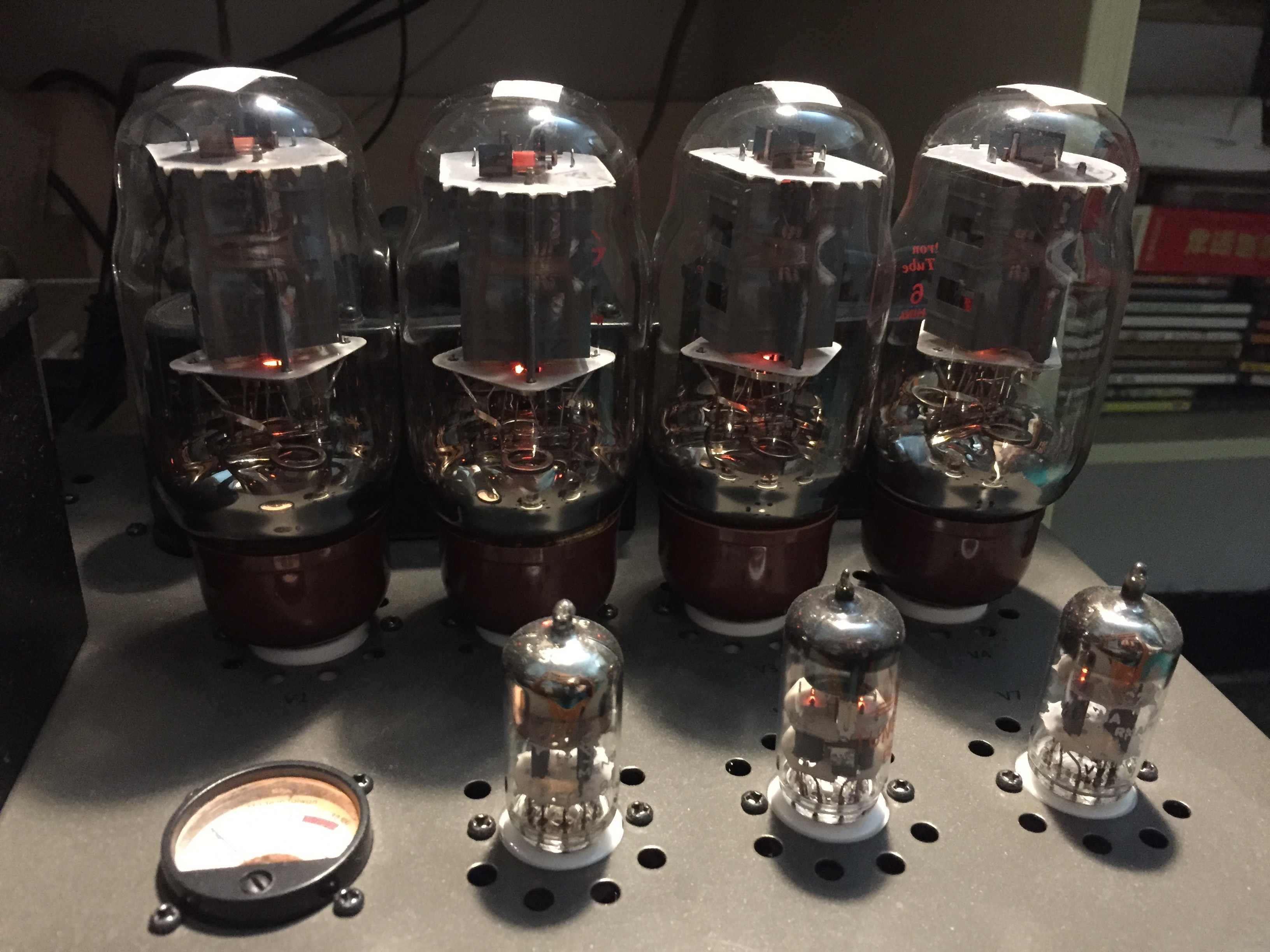 运行KT66的胆机